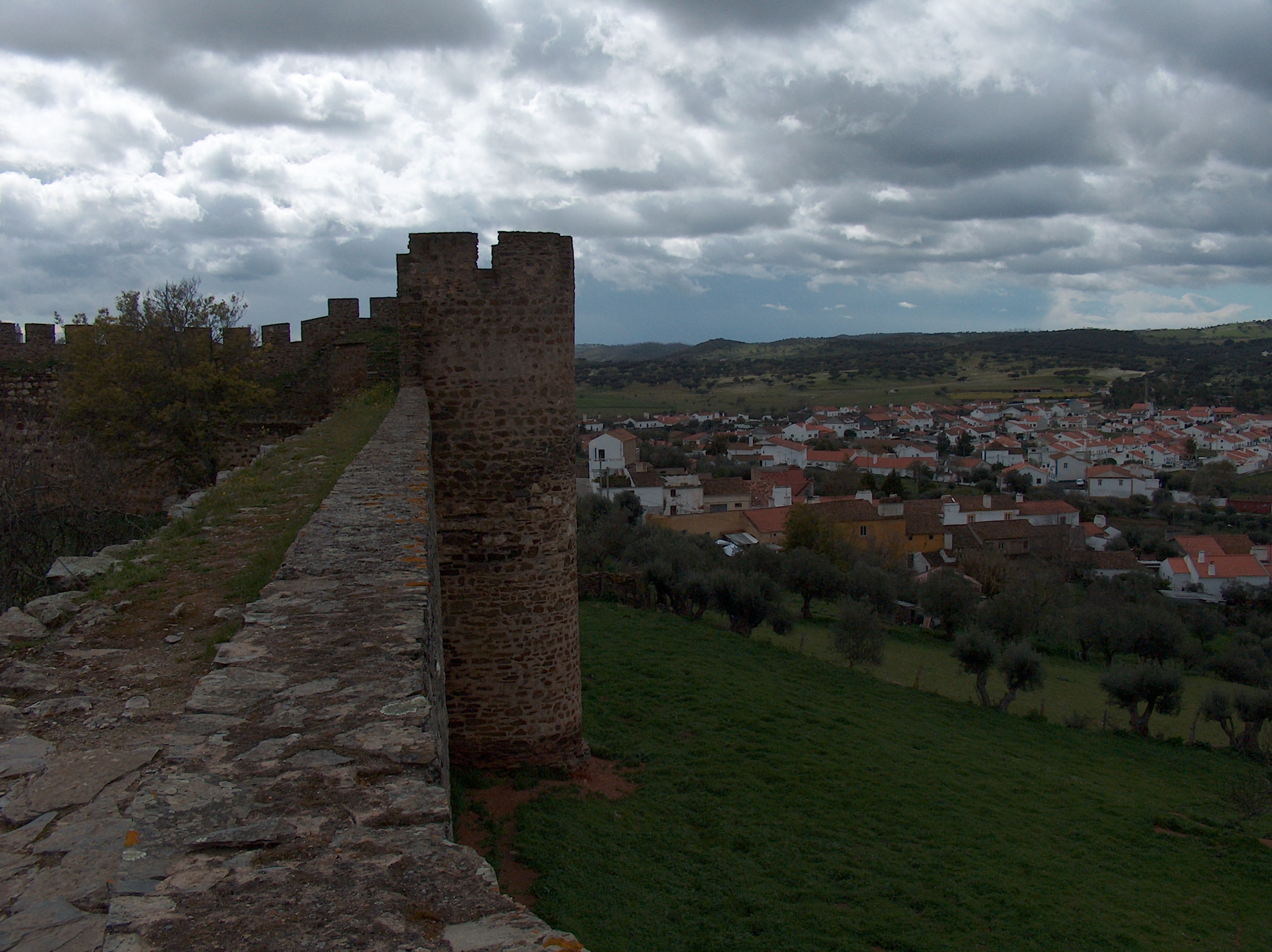 Castelo de Terena